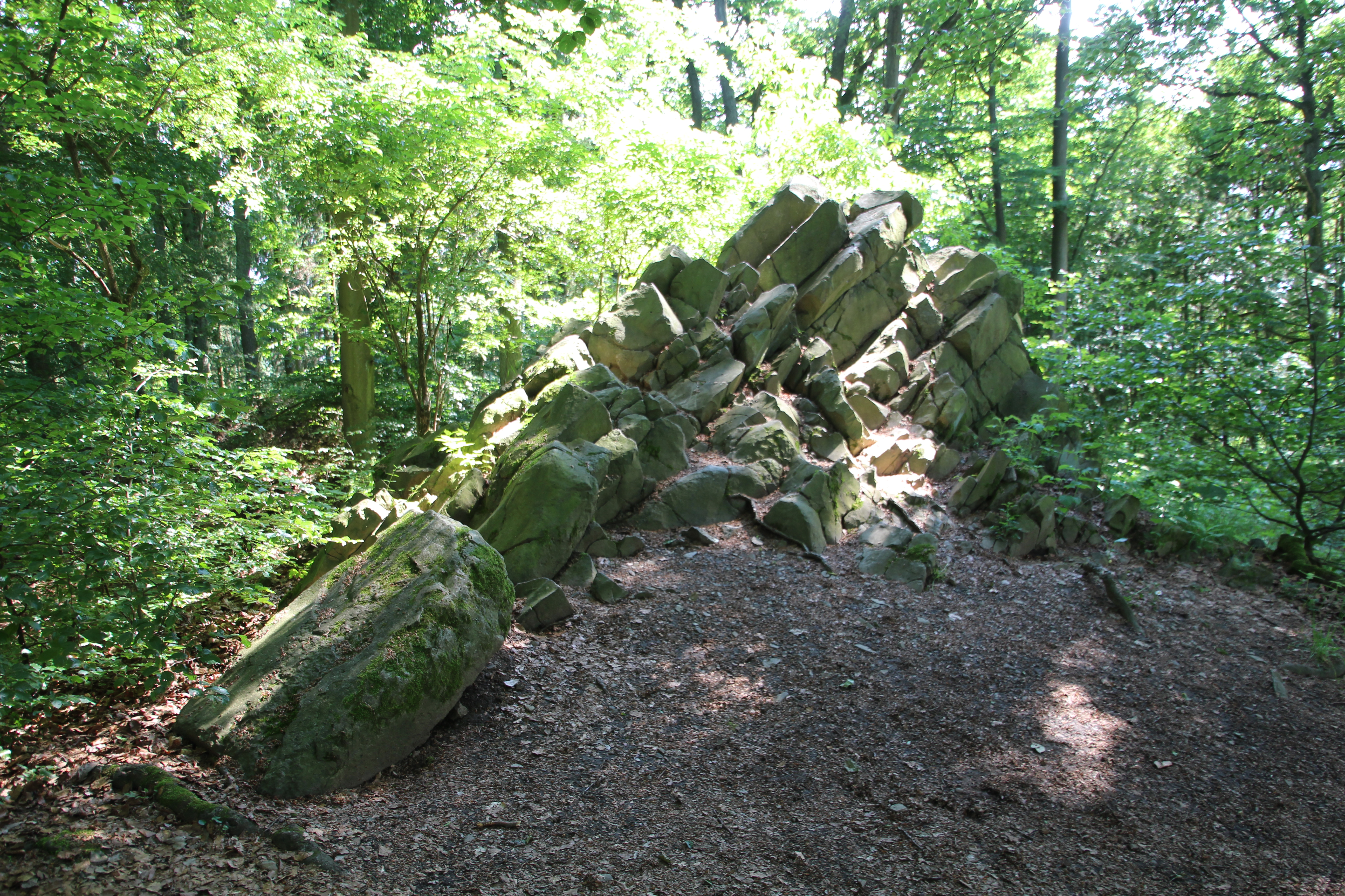 Gipfel des Himberg/Königsstuhl etwas westlich der Sternschanze (Lahnau))